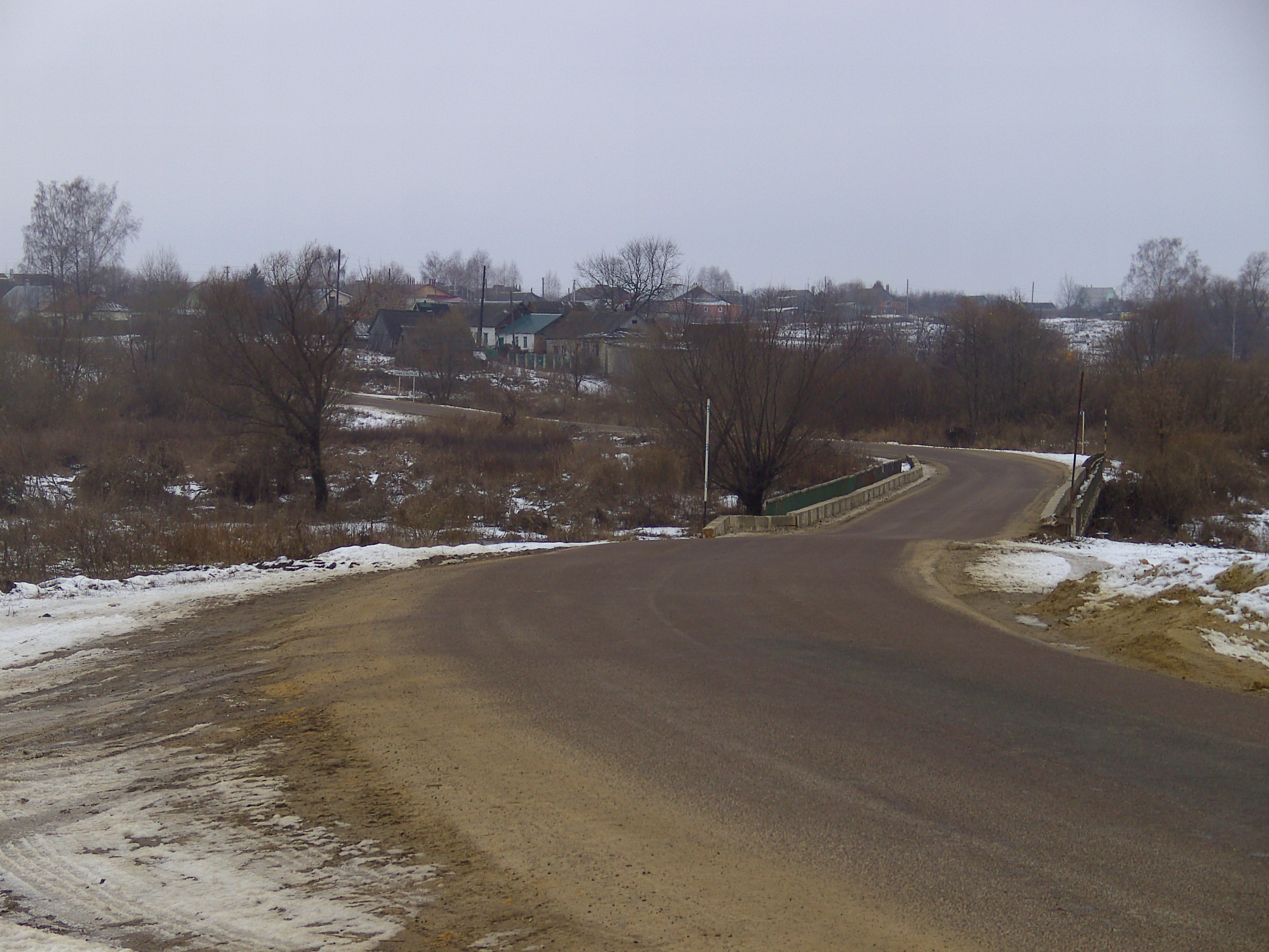 Мост к Никольскому